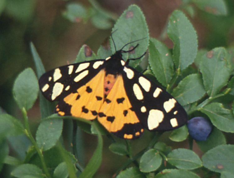 Schwarzer Bär (Arctia villica), Bärenspinner (Arctiidae) - Österreich/Austria/Autriche: Steiermark, "Lerchwald" im Feistriztal N Großsteinbach